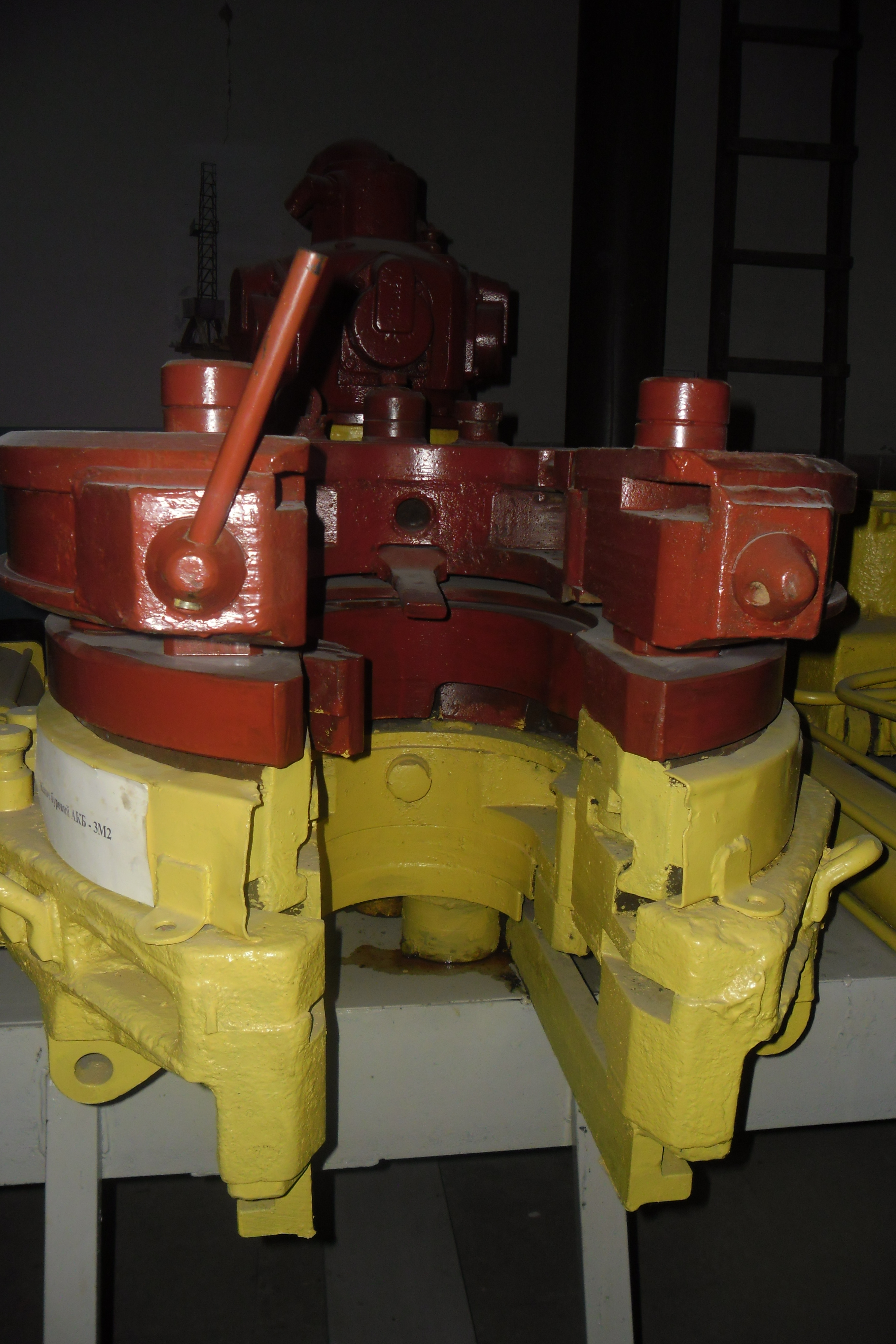 Фото